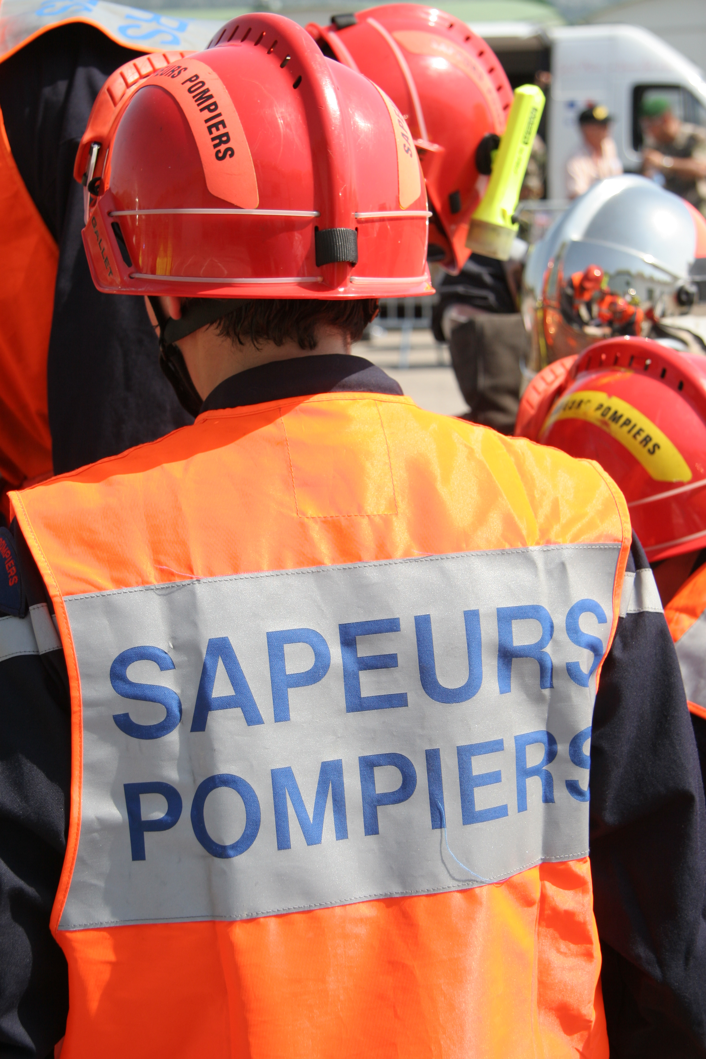 Sapeur pompier français équipé d'un casque F2